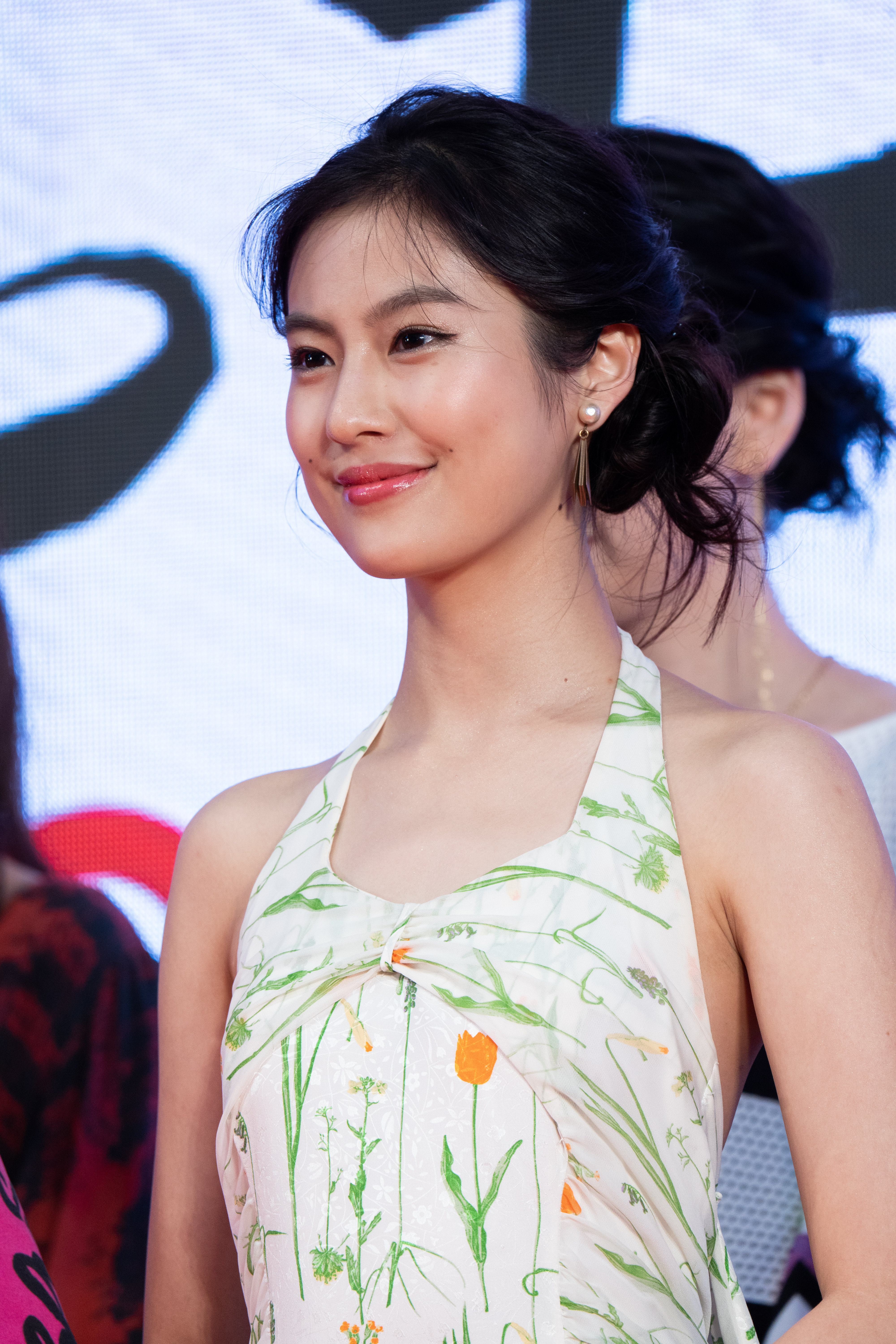 第32回 東京国際映画祭 オープニングセレモニー 恒松祐里 (タイトル、拒絶)